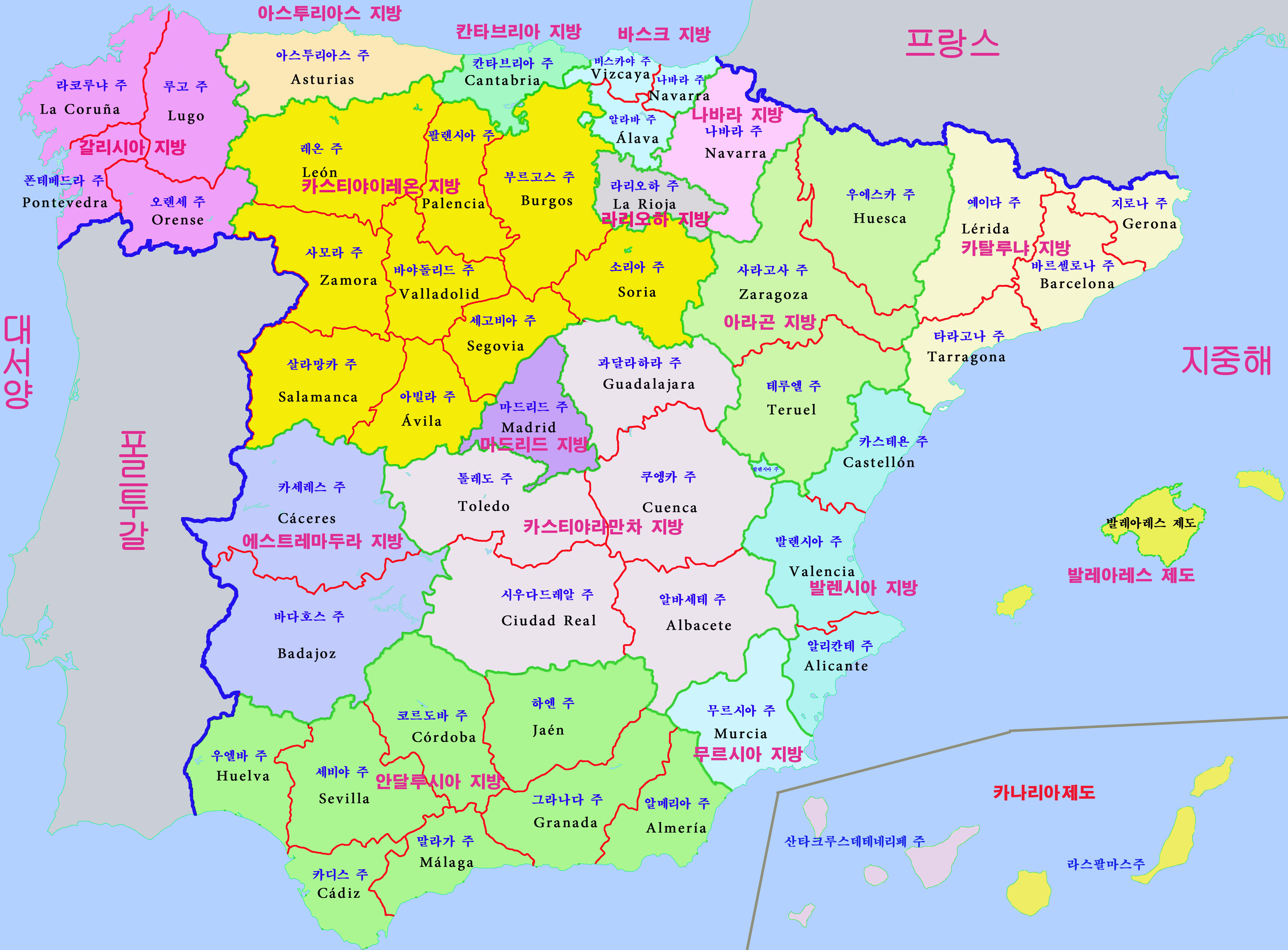 스페인 행정지도